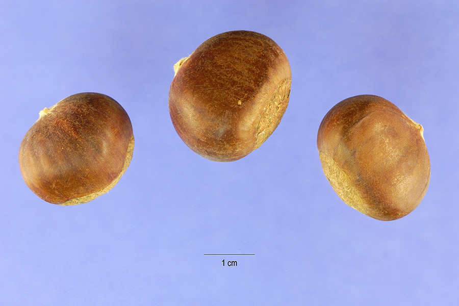 Castanea molissima (Castaño chino) : Aquenios sueltos.